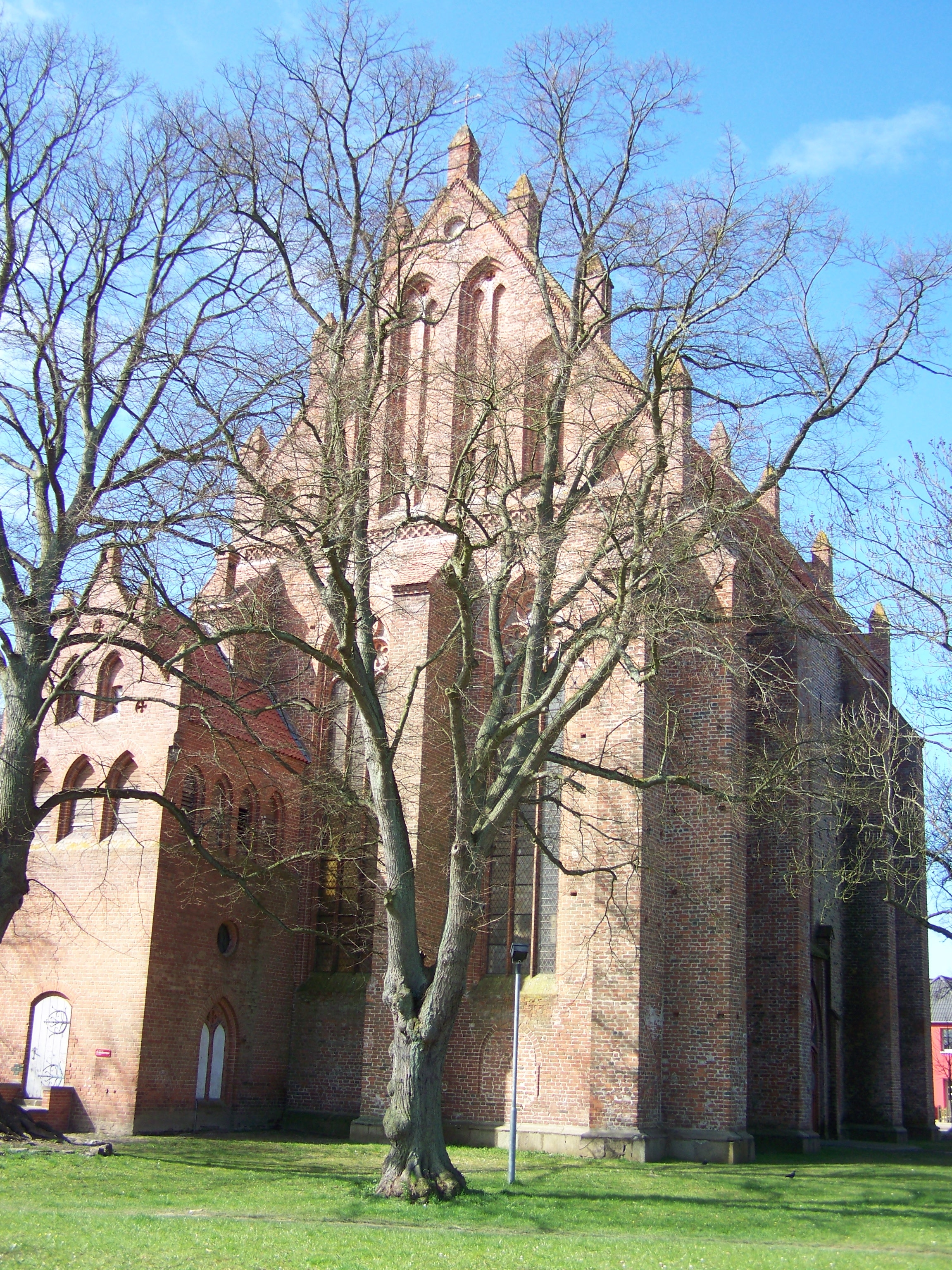 Franzburg, Kirche - Giebelansicht (2008-04-20)